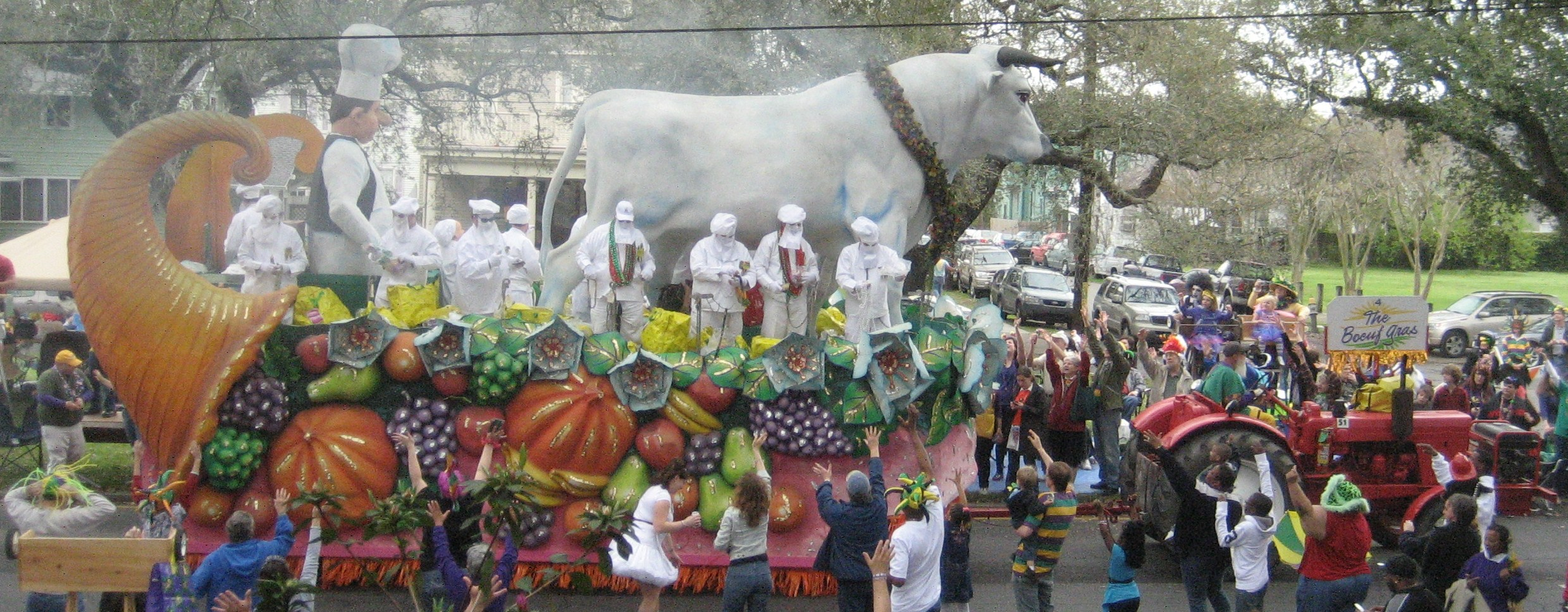 Le char du Bœuf Gras avenue Napoléon à la Nouvelle Orléans.